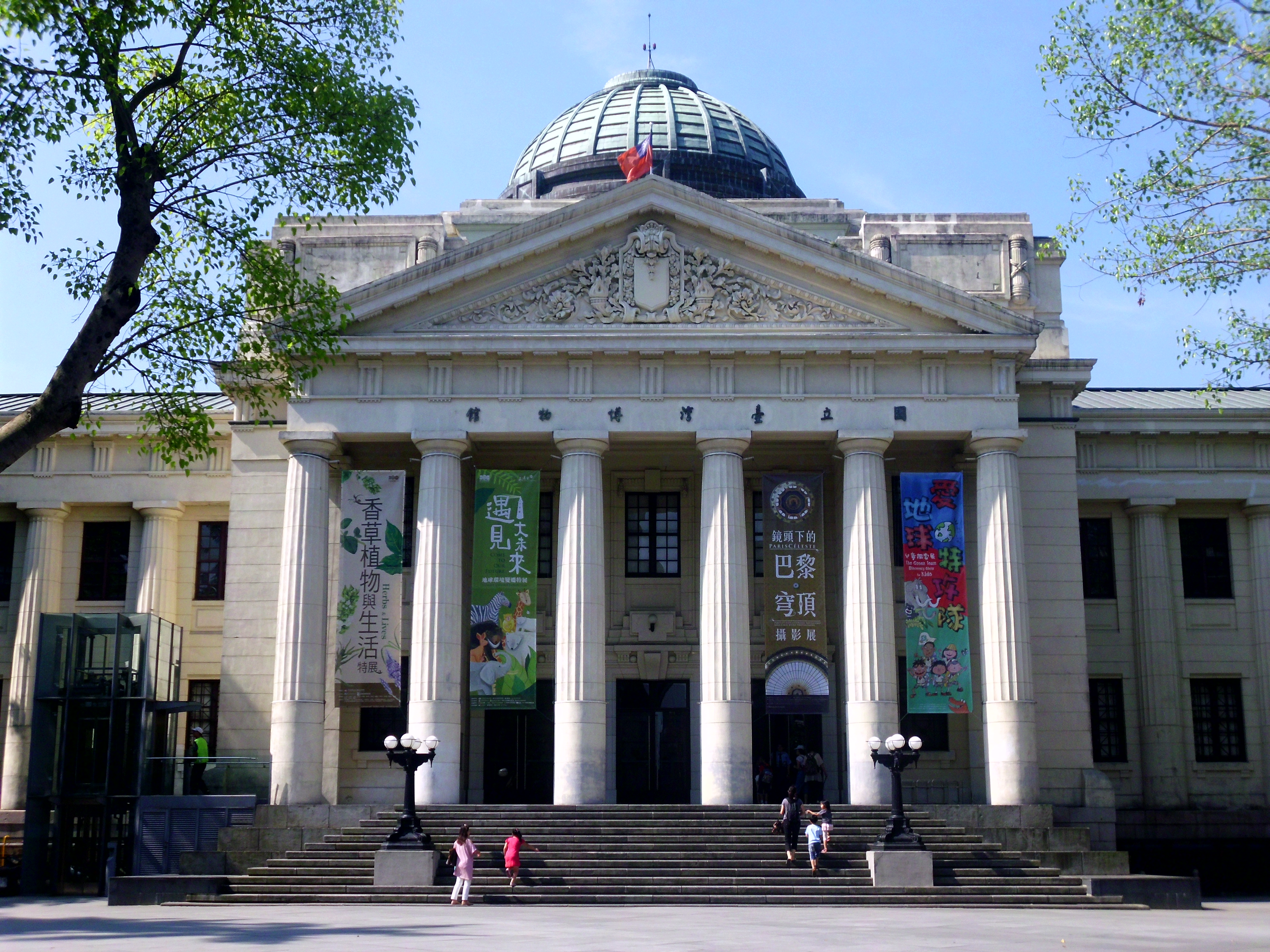 國立台灣博物館